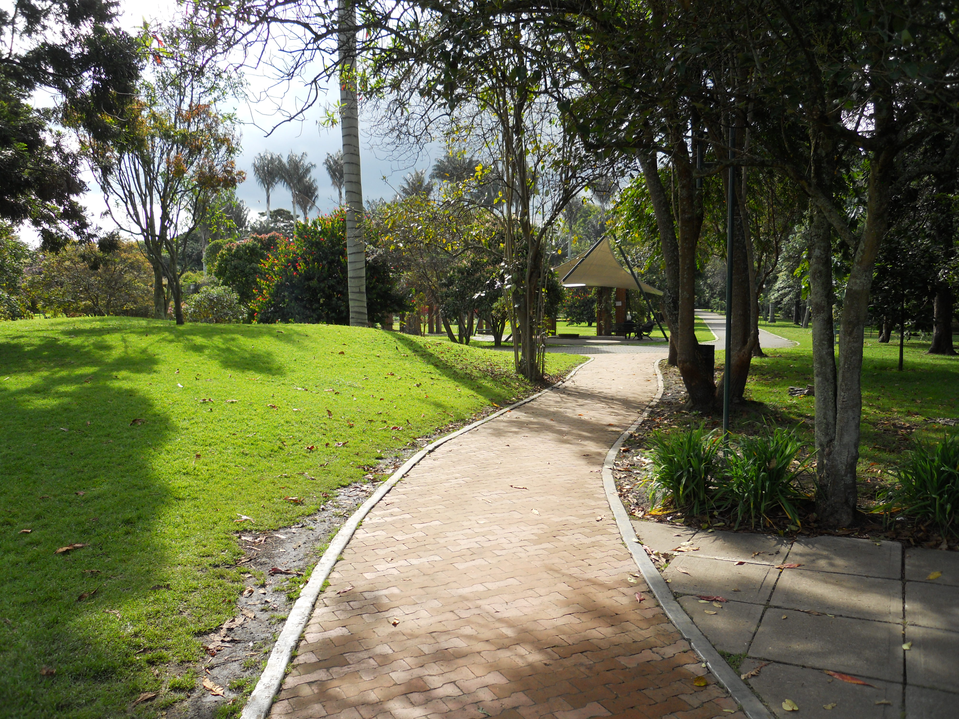 Sendero de ladrillo en el Jardín Botánico de Bogotá.